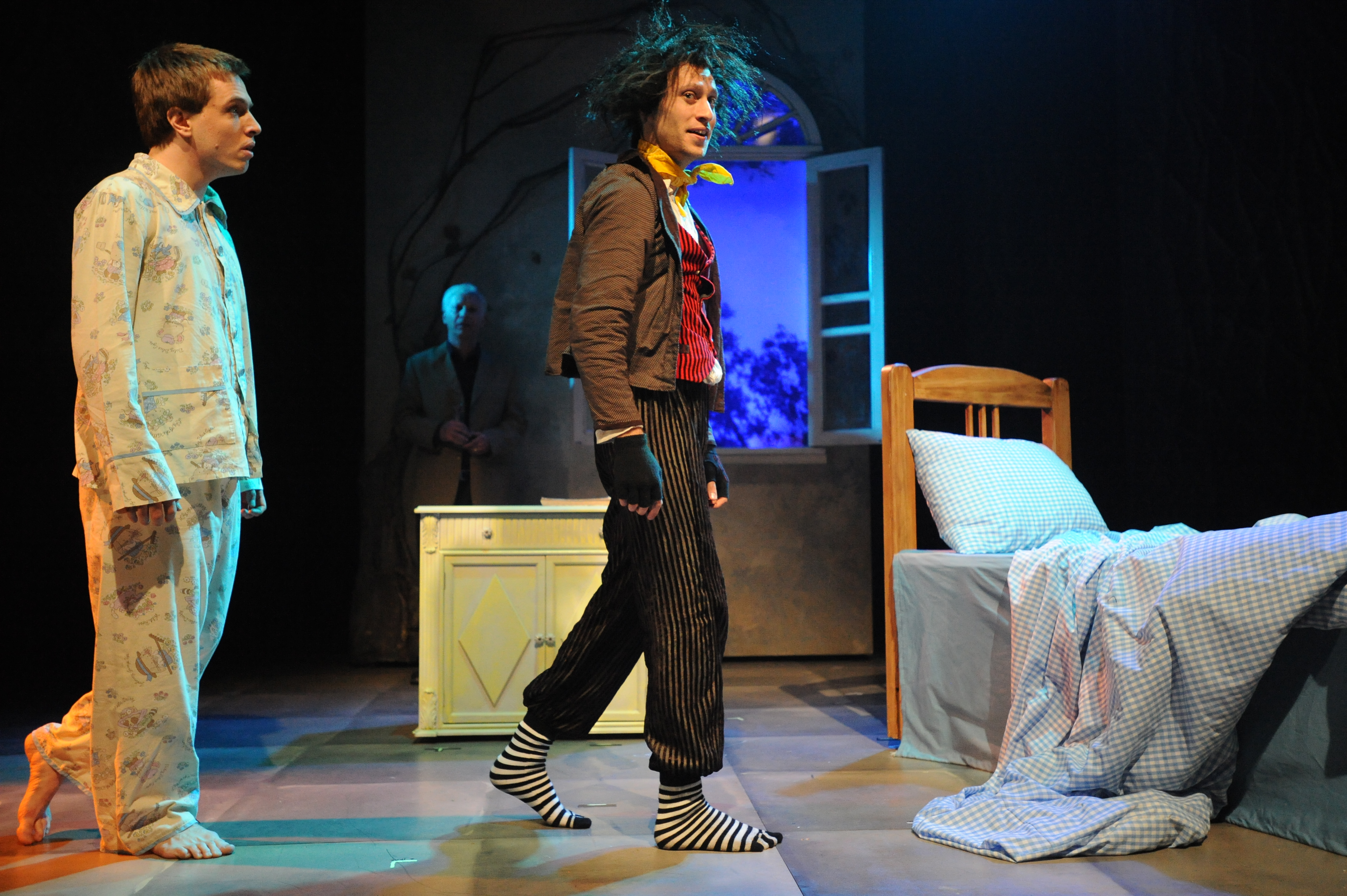 ויטלי פרידלנד ואודי רוטשילד בהצגה "אהובת הדרקון", מאת ובבימויו של מיקי גורביץ',תיאטרון החאן